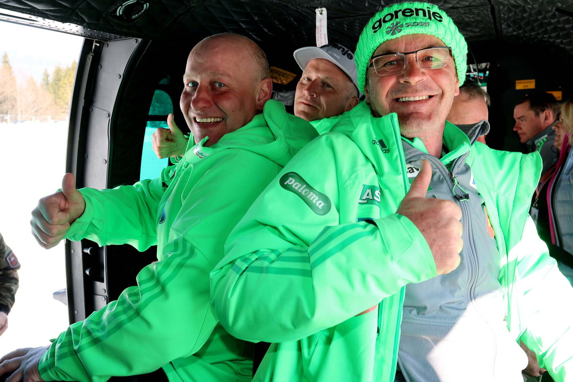 Slovenska vojska je tudi letos podprla Smučarsko zvezo Slovenije pri izvedbi zaključka svetovnega pokala v smučarskih poletih v Planici.